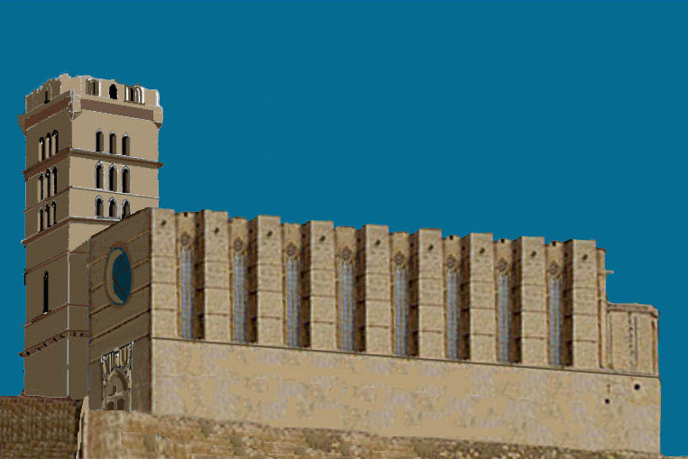 La catedral de Palma, d'una única nau, segons el pla inicial hipotètic de principi del s. XIV, després transformada en un edifici de tres naus més altes.